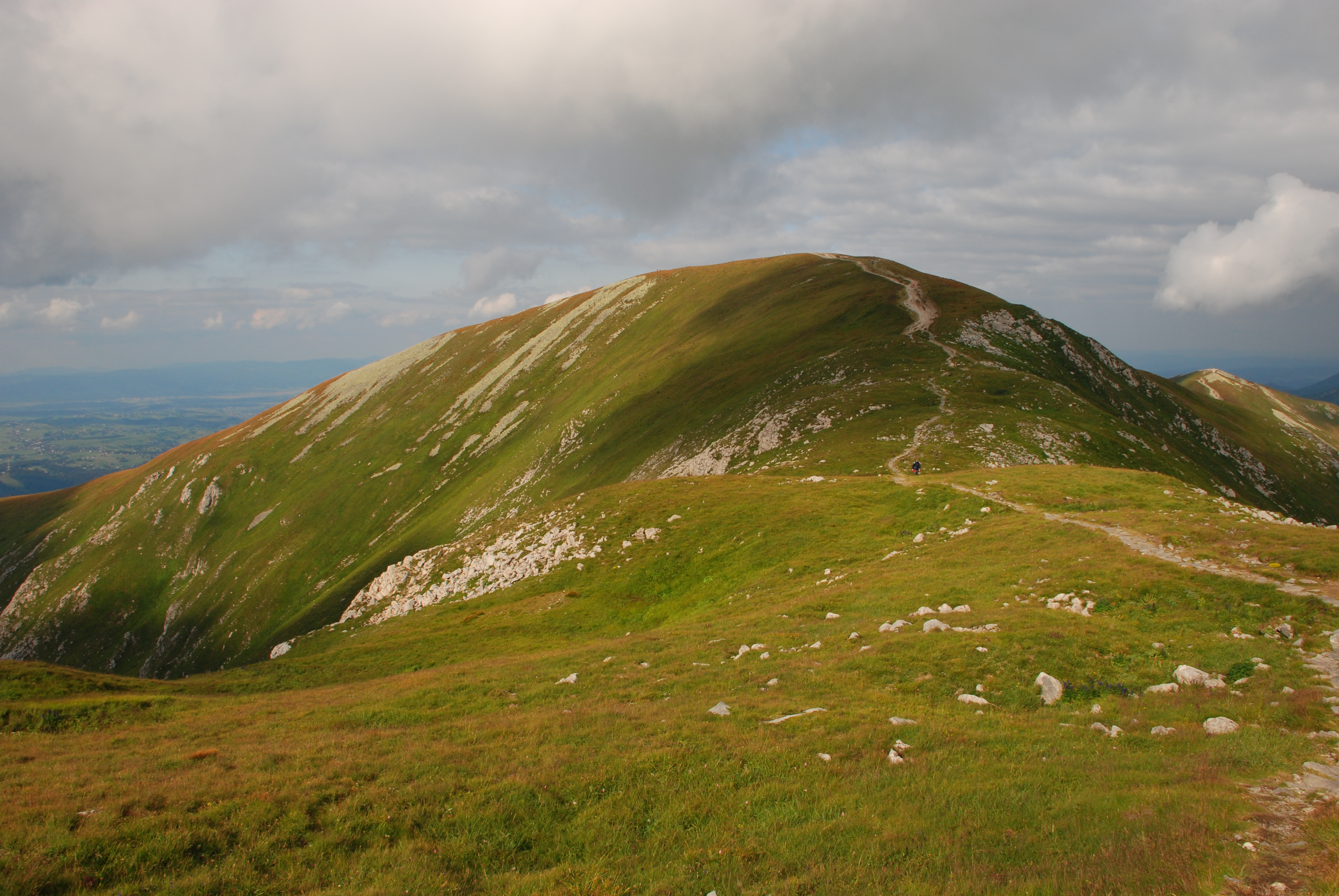 Małołączniak